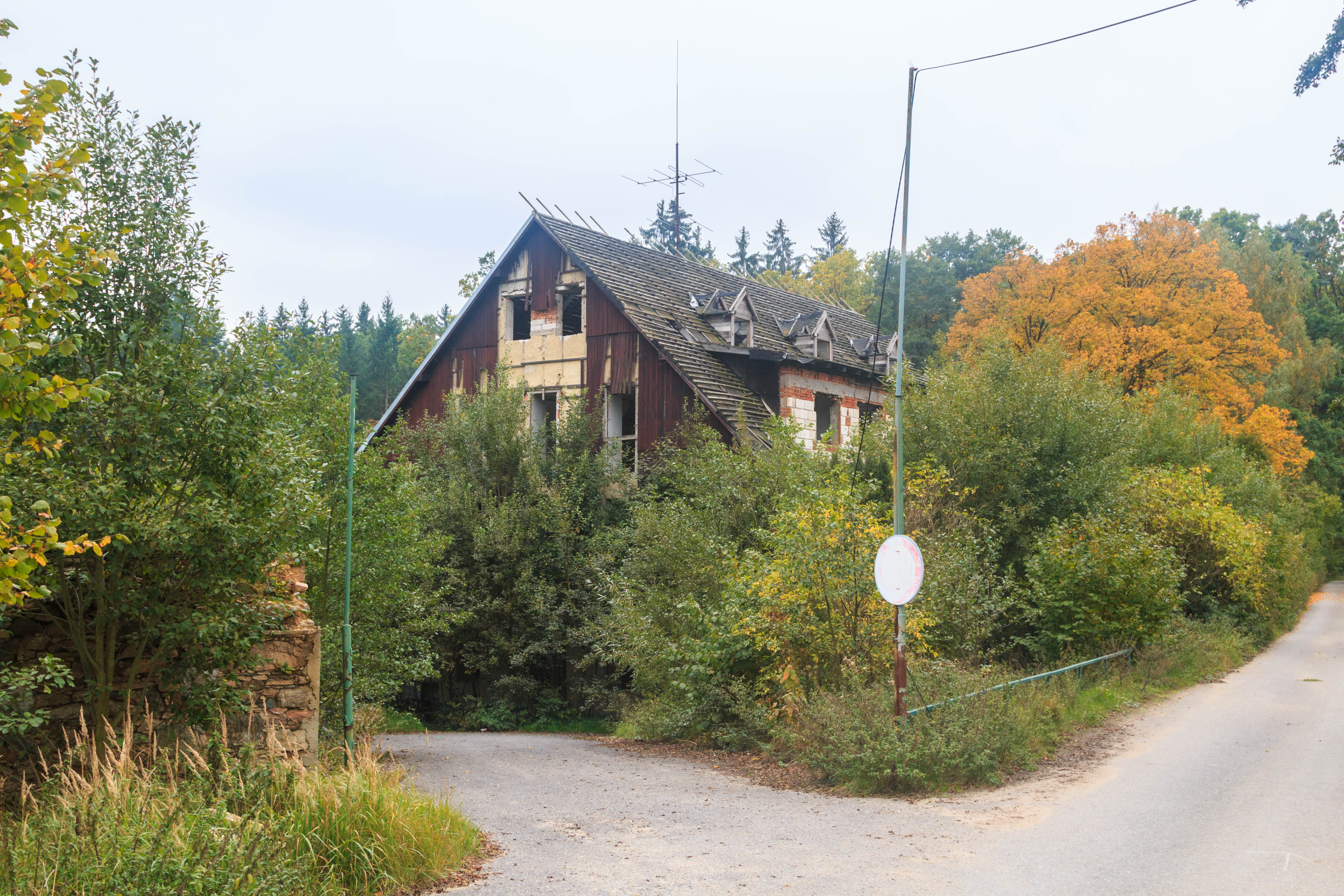 Pilský mlýn, Sedlice čp. 152, okres Strakonice.